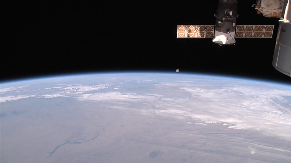 USA mit Mond (Panasonic, aft view)